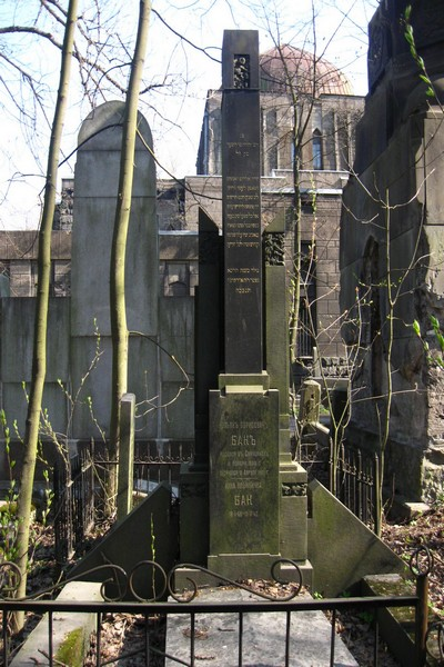 Юлиан Борисович Бак (1860—1908) — инженер путей сообщения, общественный деятель, основатель и издатель газеты «Речь».